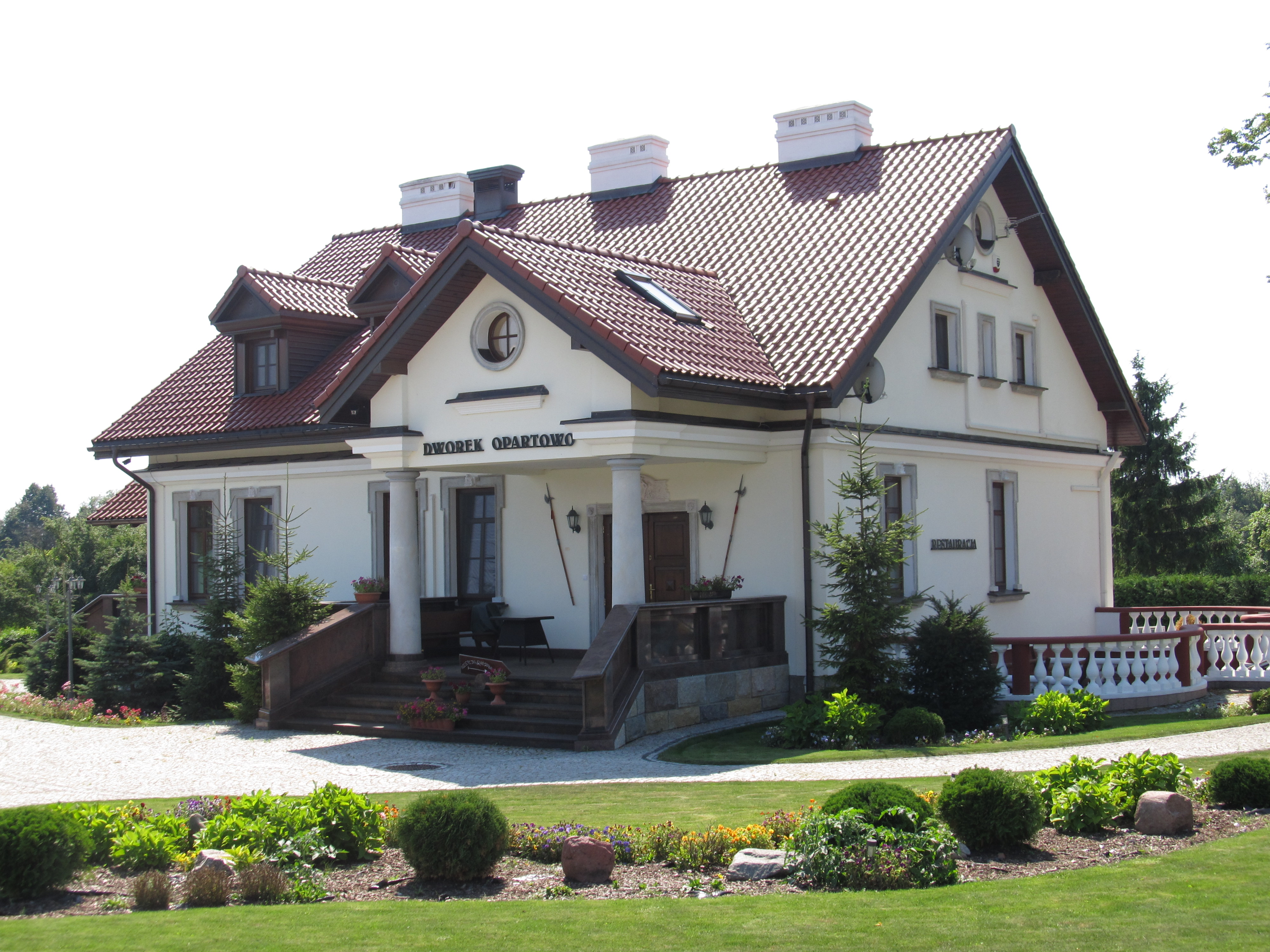 Rajgród Opartowo - zespół dworski: dwór, mur., kon. XIX w. (zabytek nr 230 z 05.09.1986)